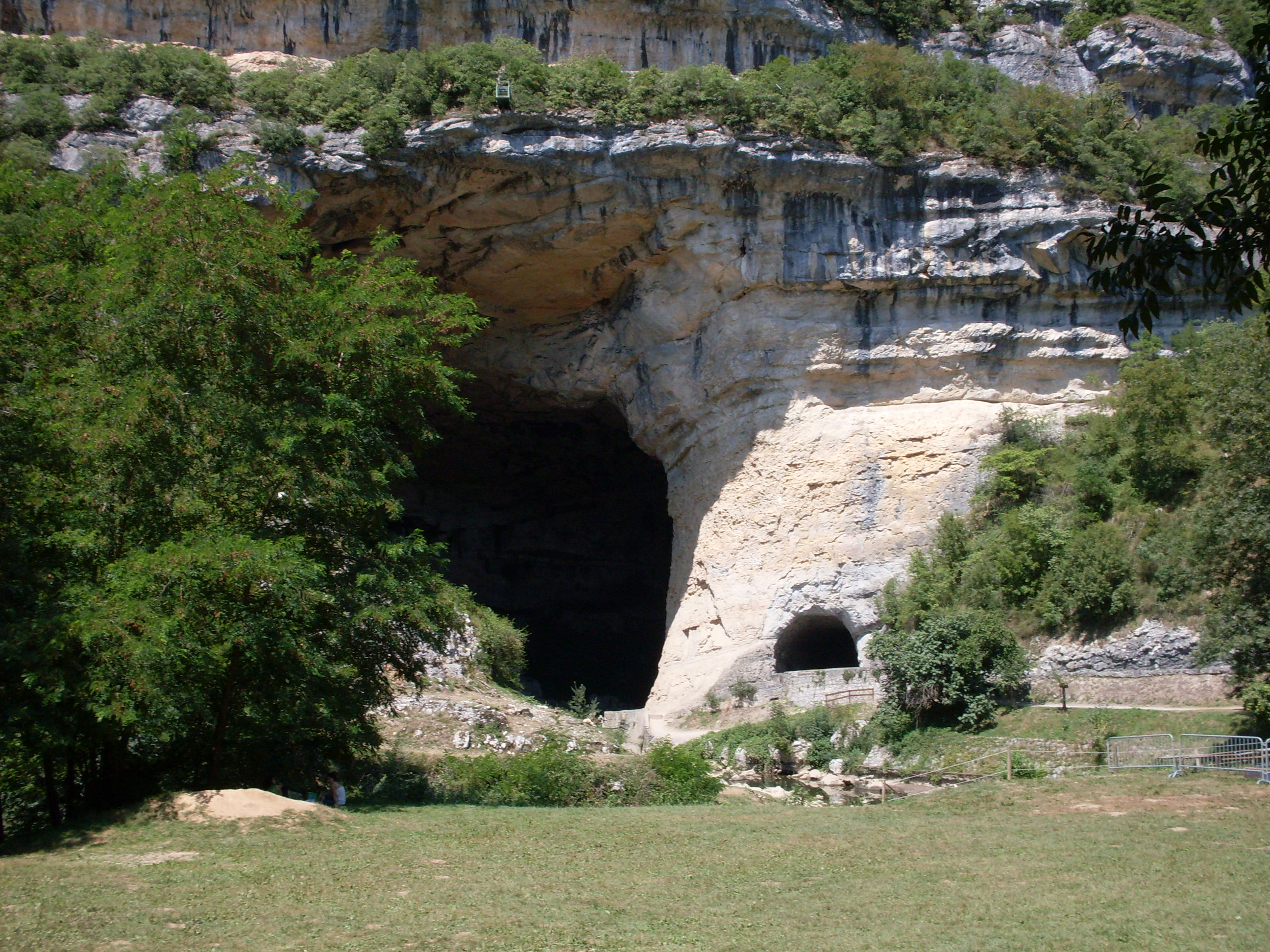 Mas-d'Azil, entrée de la grotte